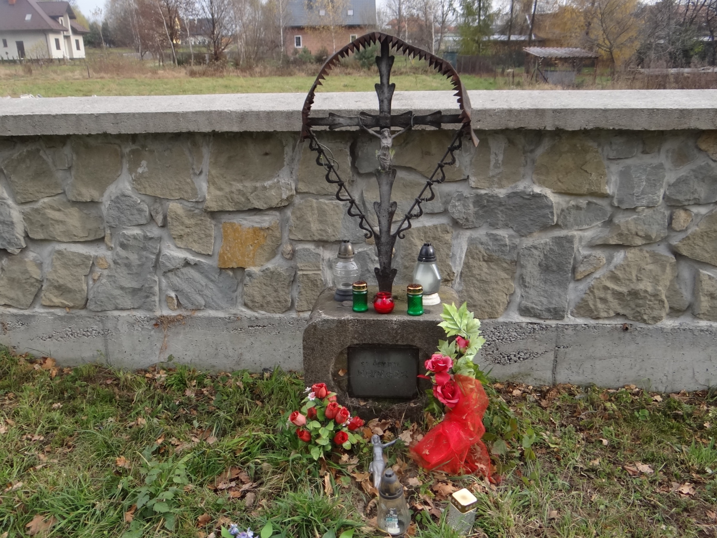 World War I Cemetery nr 273 in Szczepanów Cmentarz wojenny nr 273 - Szczepanów